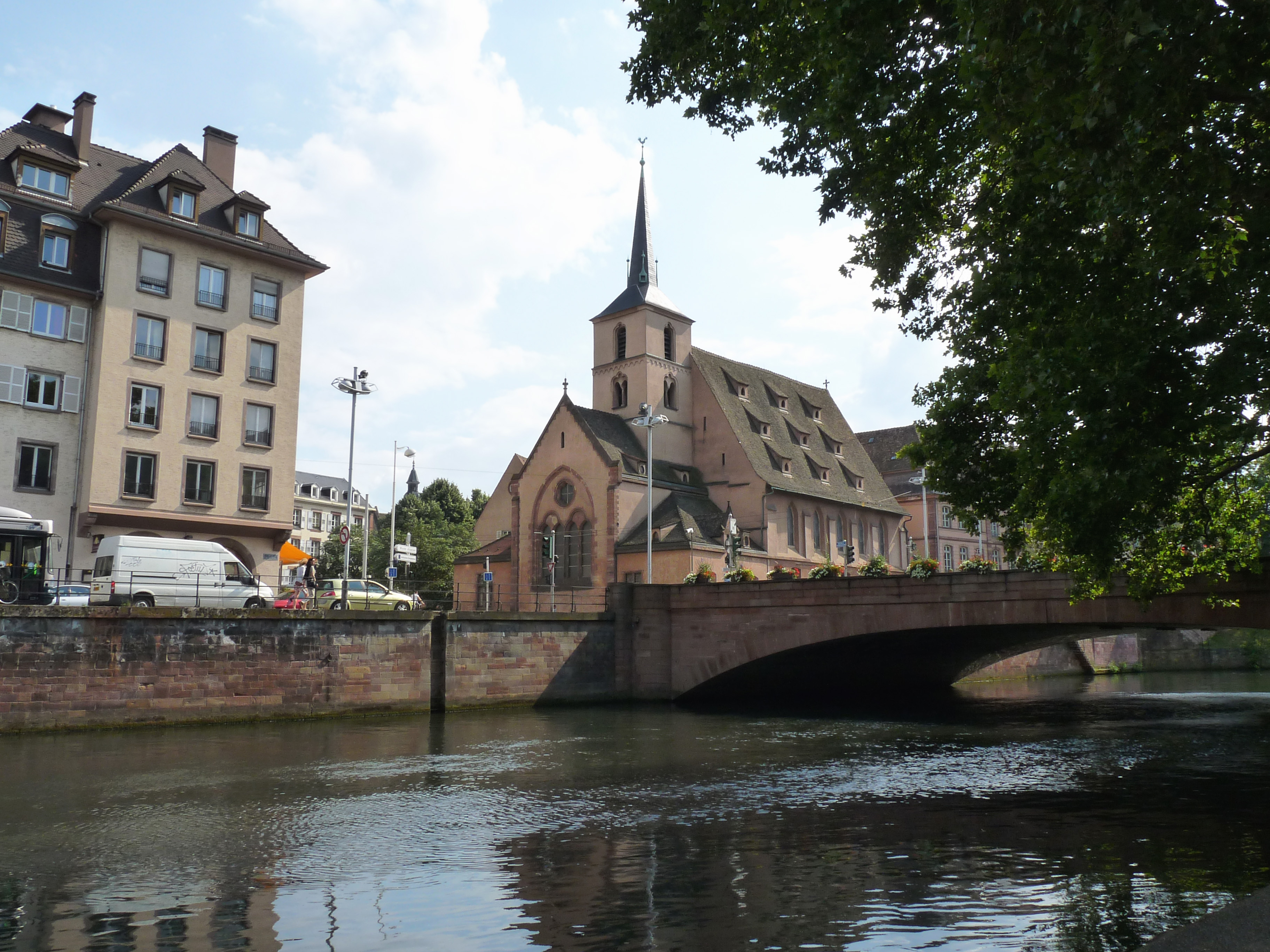 Strasbourg : Église Saint-Nicolas